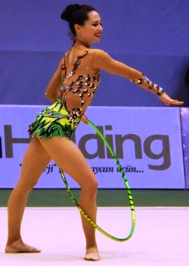 Ирина Ризенсон (Израиль). ЧЕ по худож.гимнастике в Баку 2009